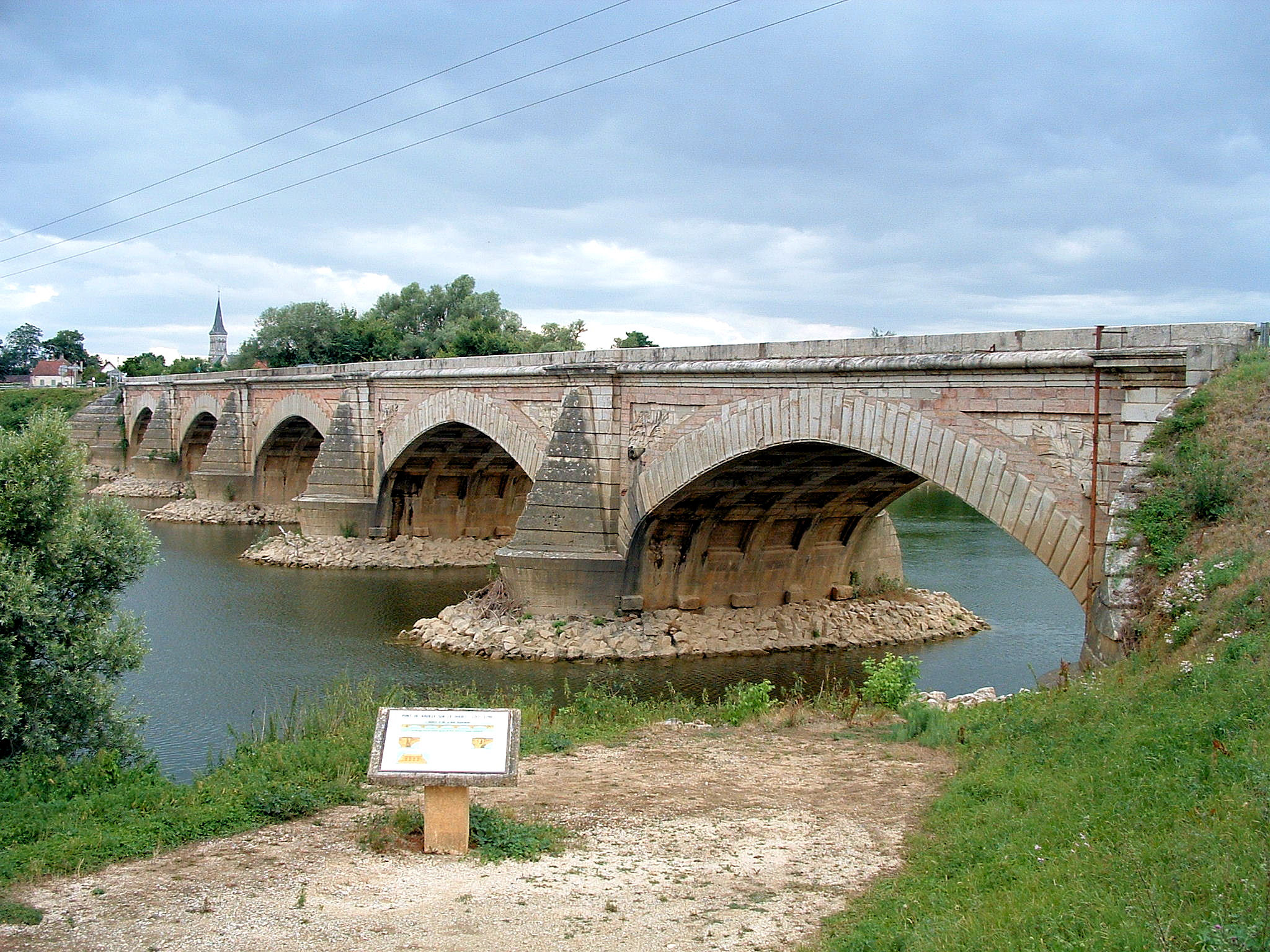 Navilly - Pont sur le Doubs - Ensemble côté amont